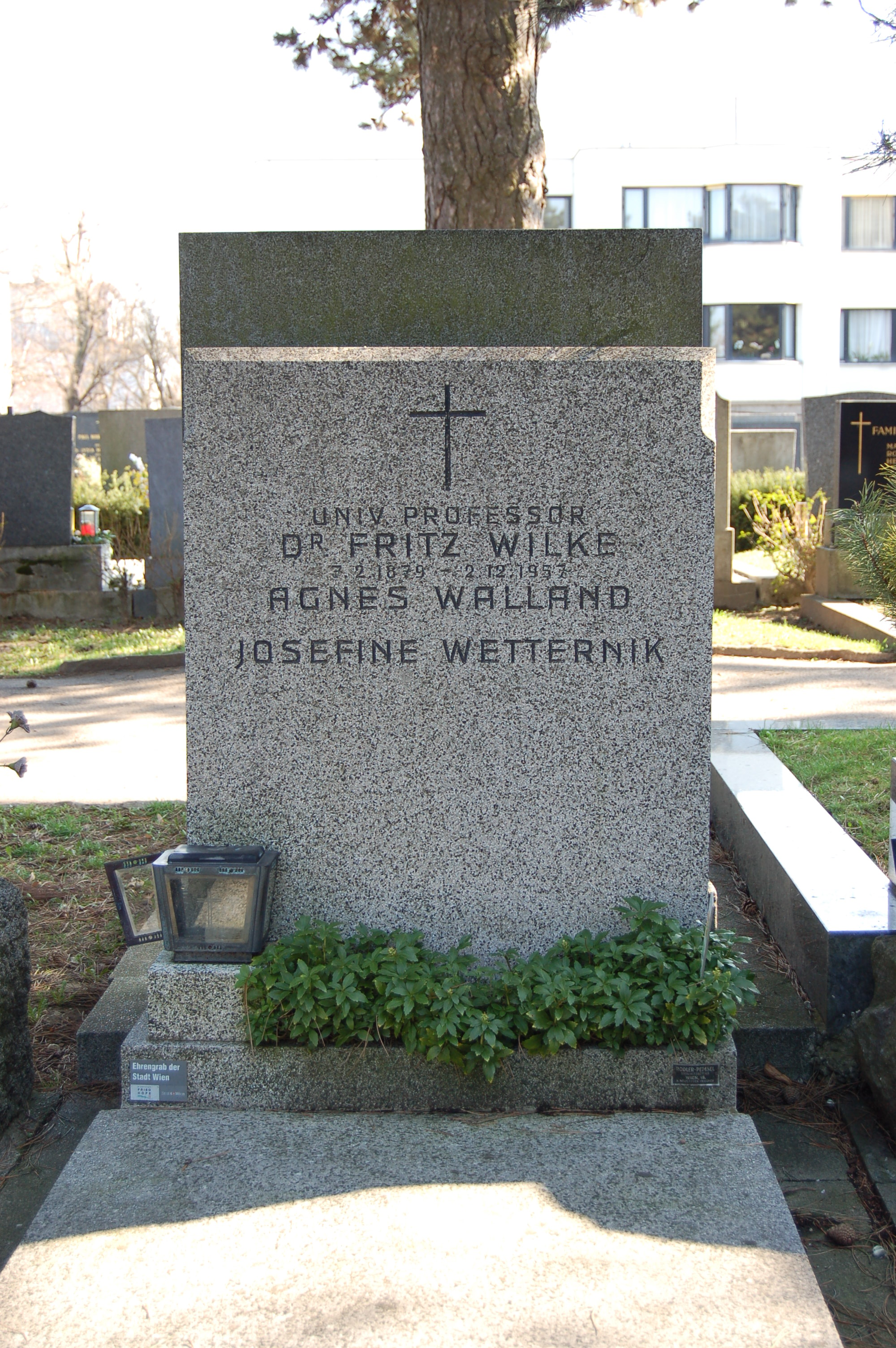 Neustifter Friedhof, Grabstätte von Fritz Wilke (Ehrengrab der Stadt Wien)